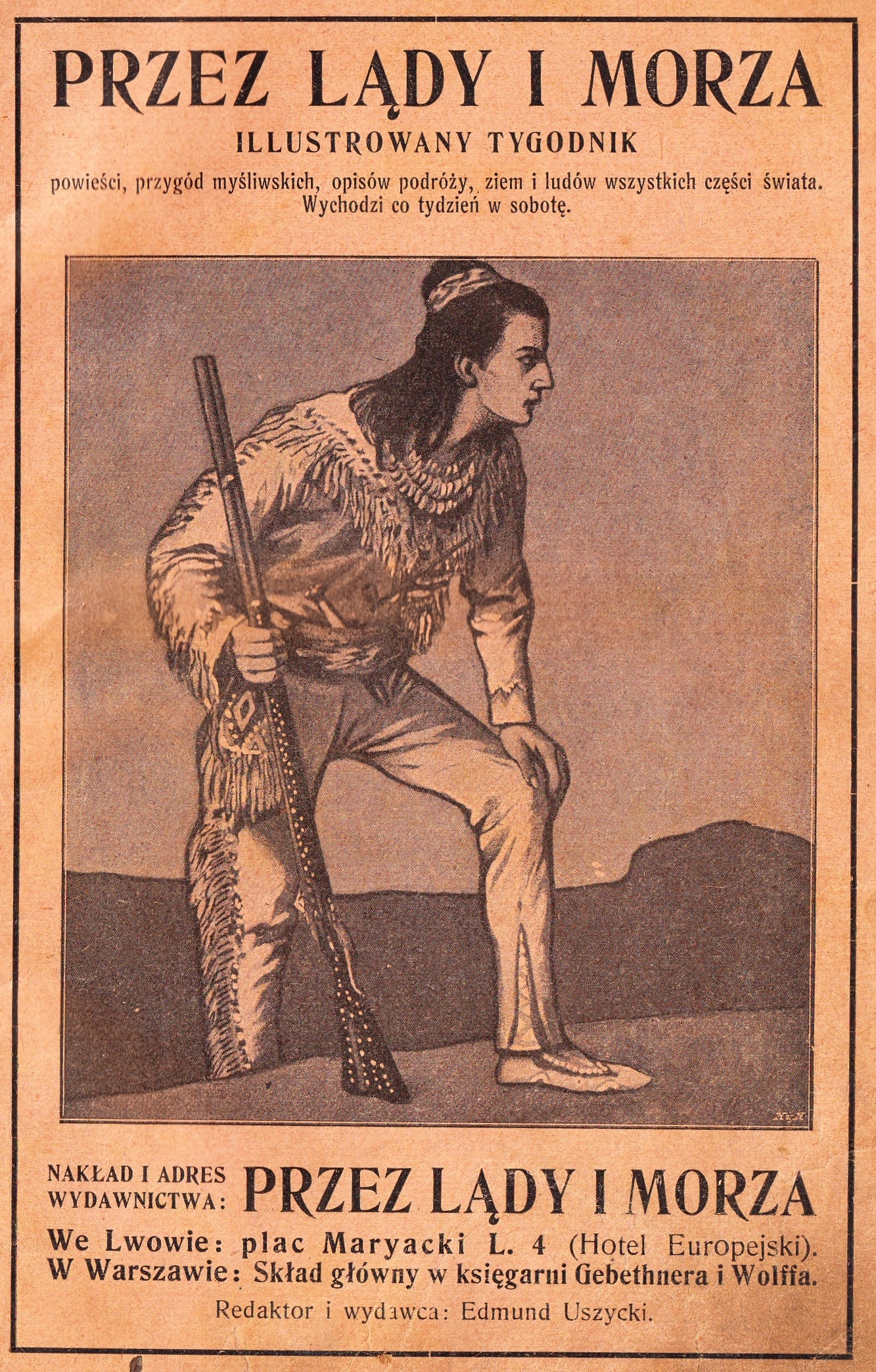 skan z książki PL publikacja Wydawnictwo "Przez Lądy i Morza" Lwów 1910